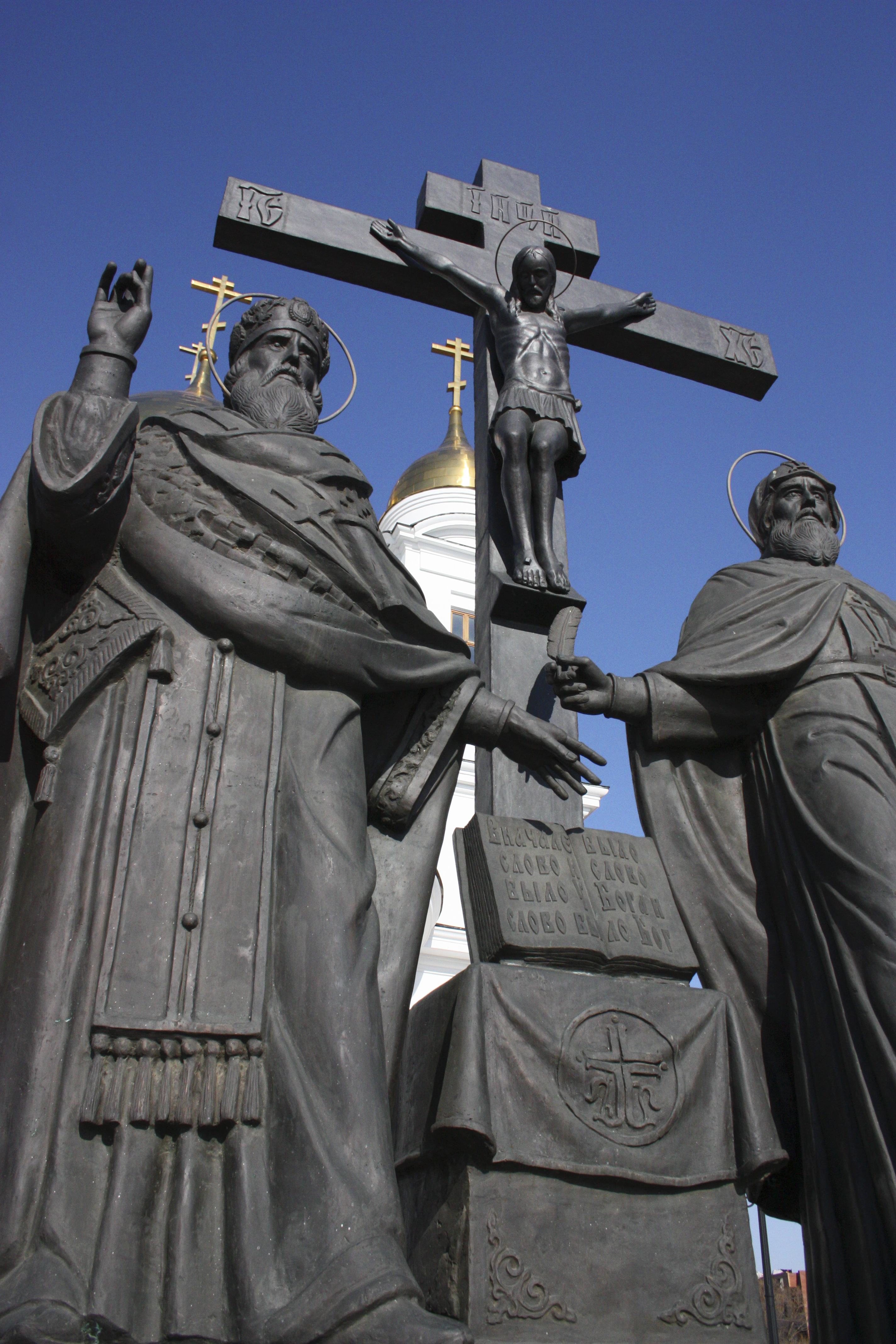 Самара, Собор равноапостольных Кирилла и Мефодия